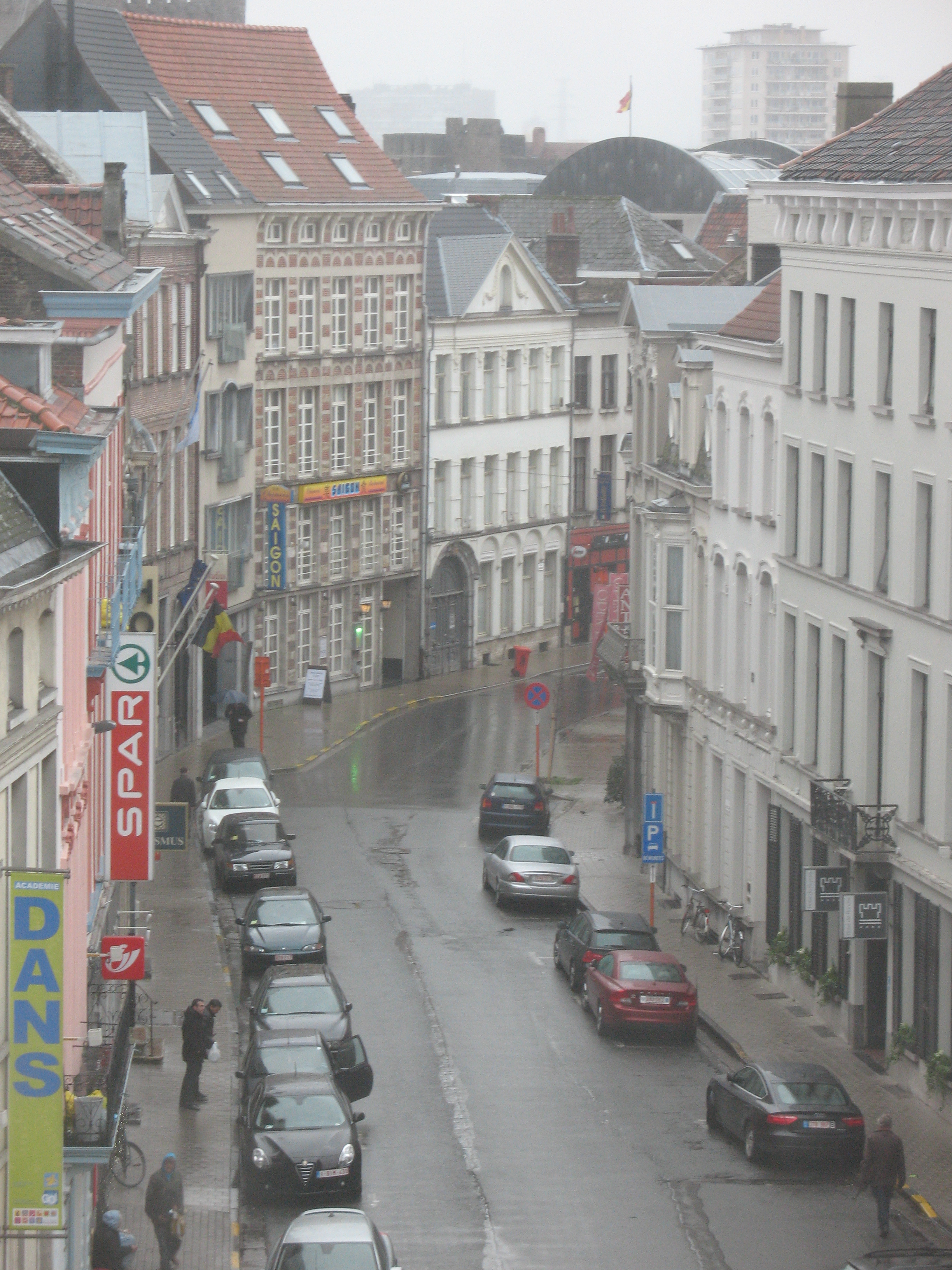 Gent - Drabstraat 32